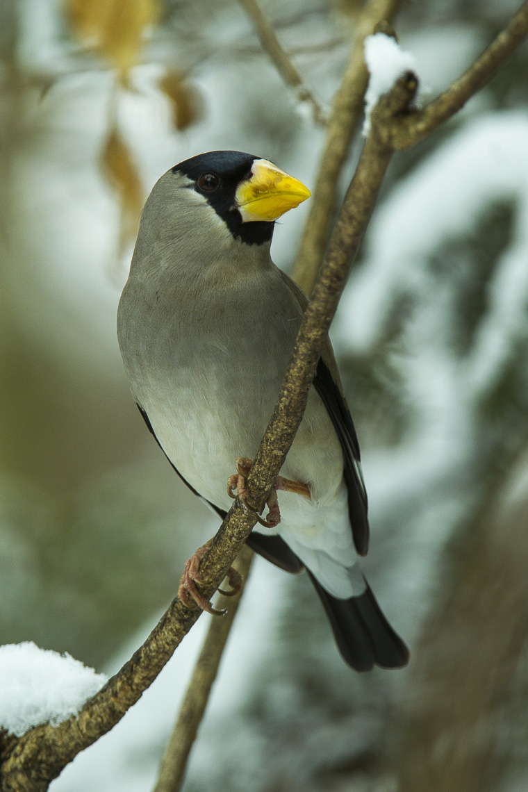 Japanese Grosbeak - Honshu - Japan_S4E2393